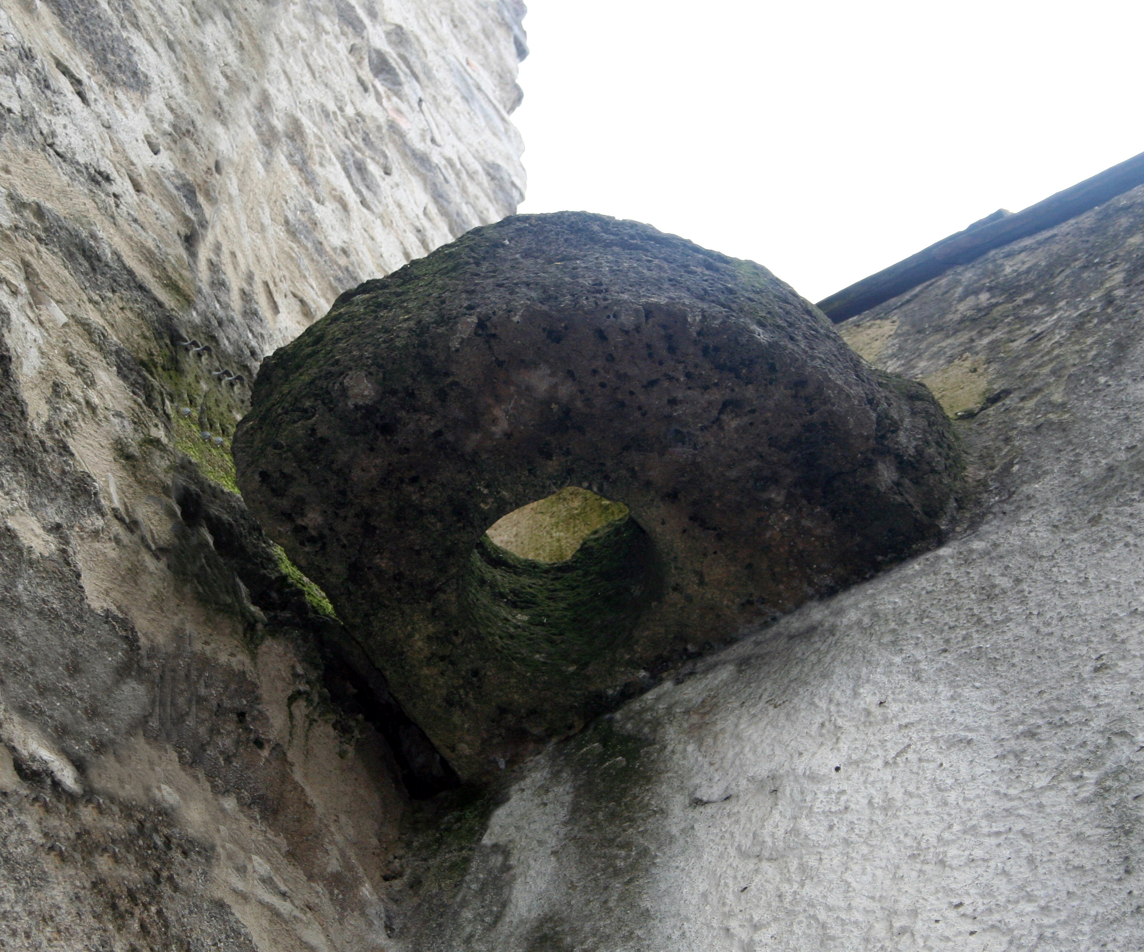 Cardine in pietra ove alloggiava il portone che veniva chiuso la notte o in caso di attacco